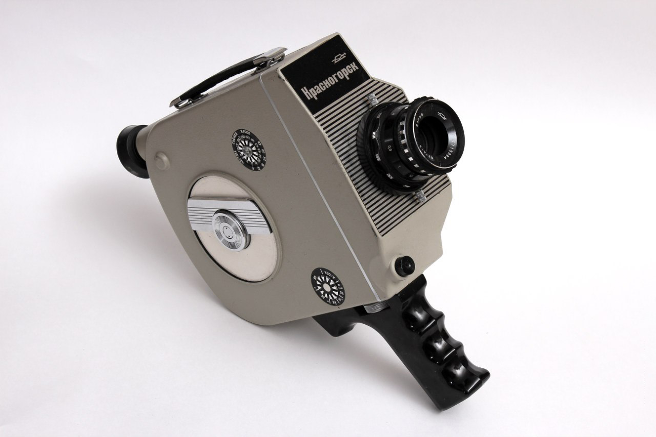 Красногорск